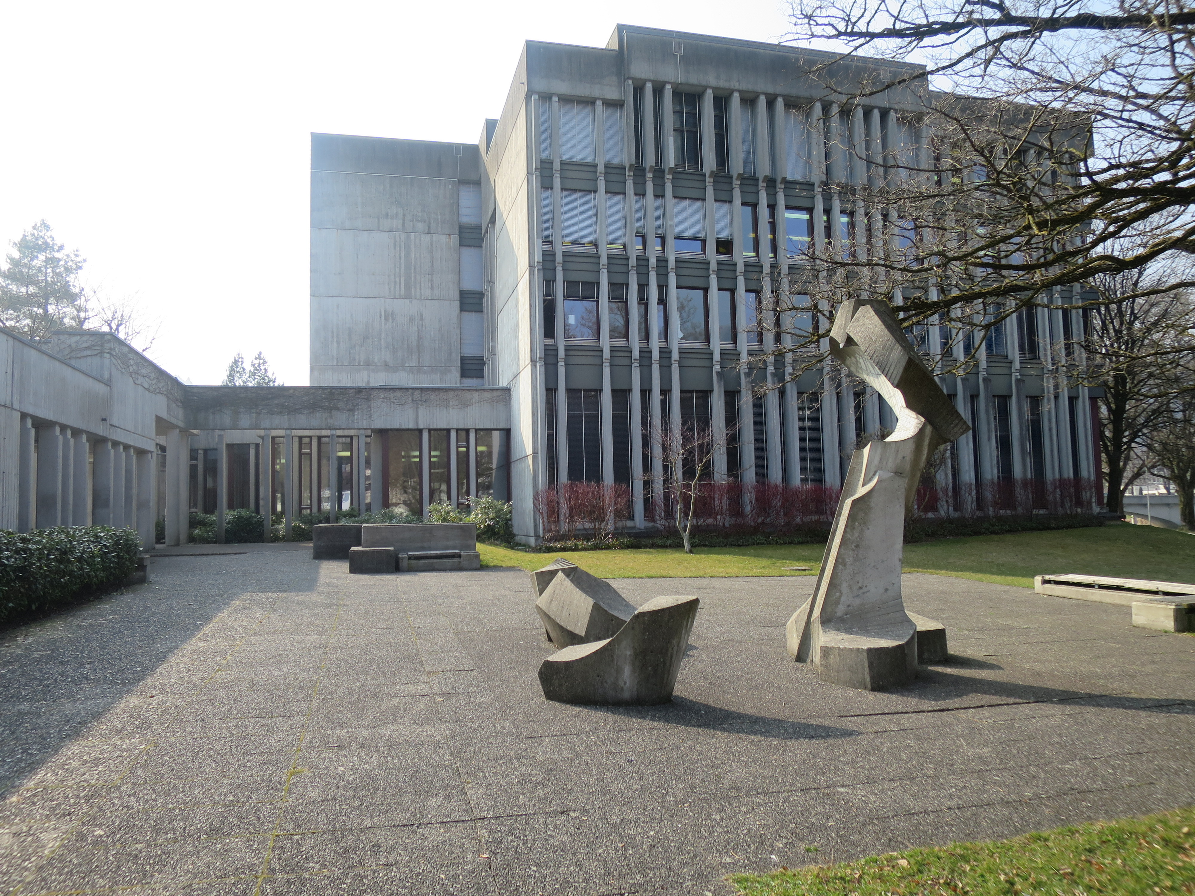 Kantonsschule Wattwil, erbaut von Otto Glaus 1968-70